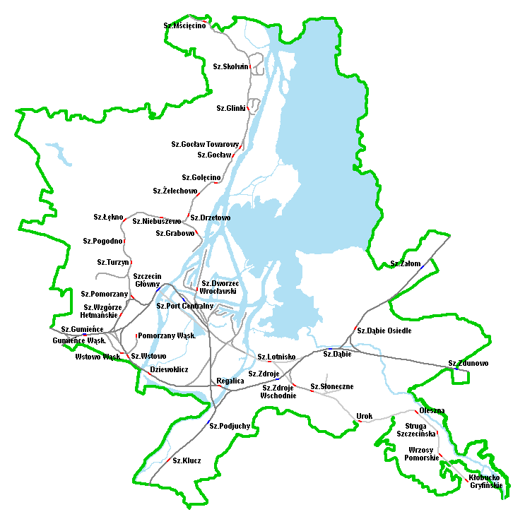 Mapa stacji kolejowych w Szczecinie